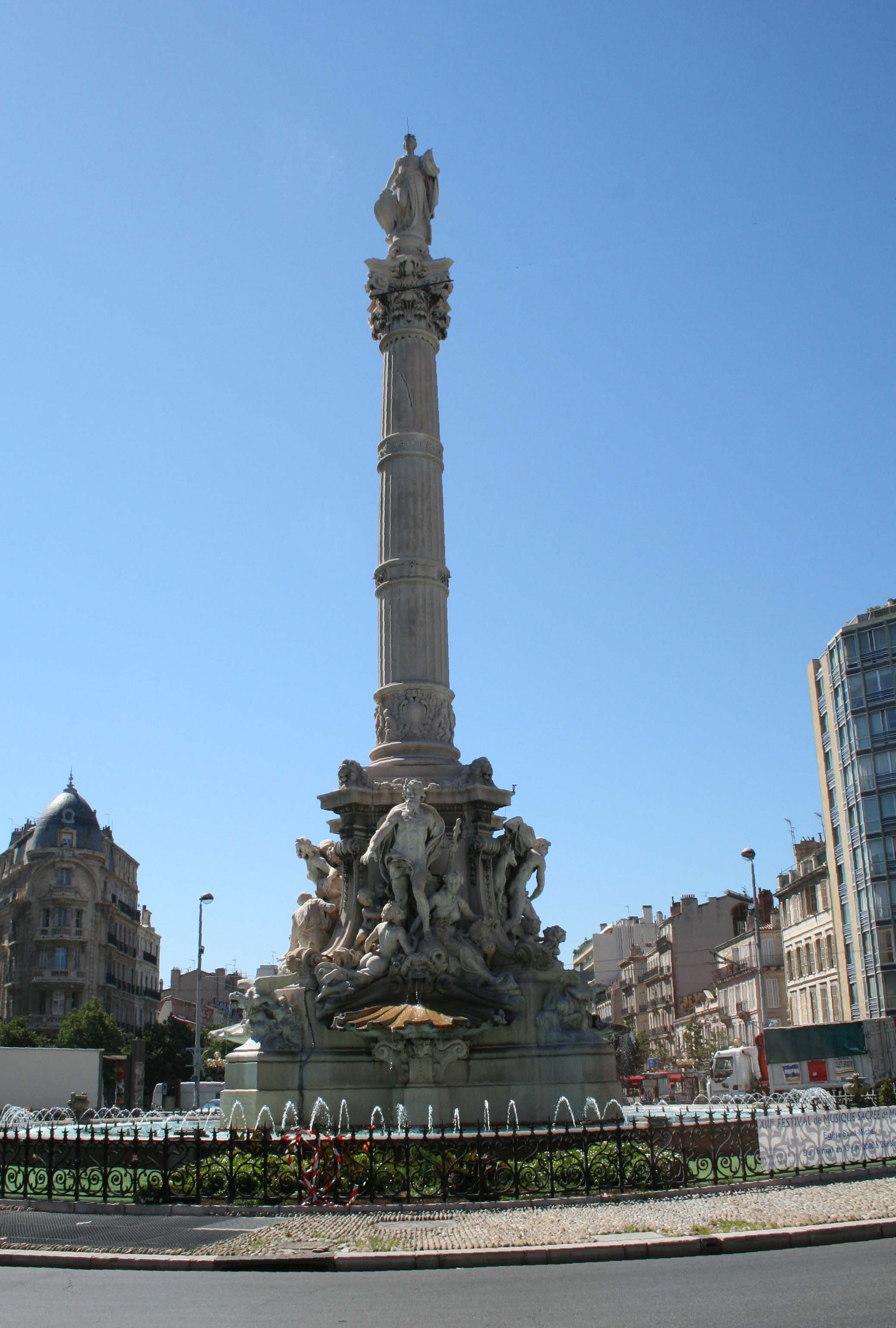 Fontaine de la place Castellane offerte par le marbrier Jules Cantini à la ville de Marseille et sculptée par André-Joseph Allar.